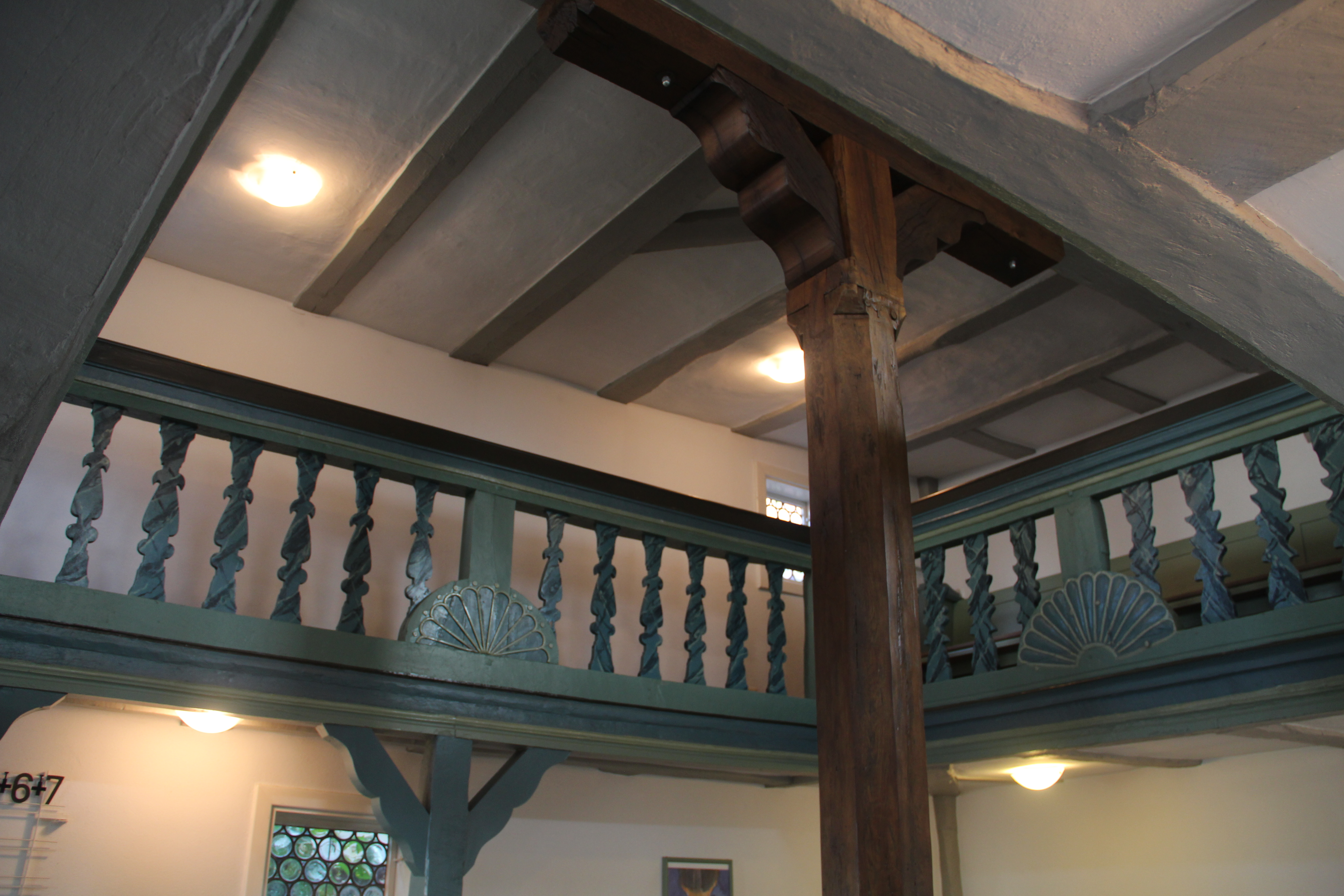 Kapelle Rachelshausen